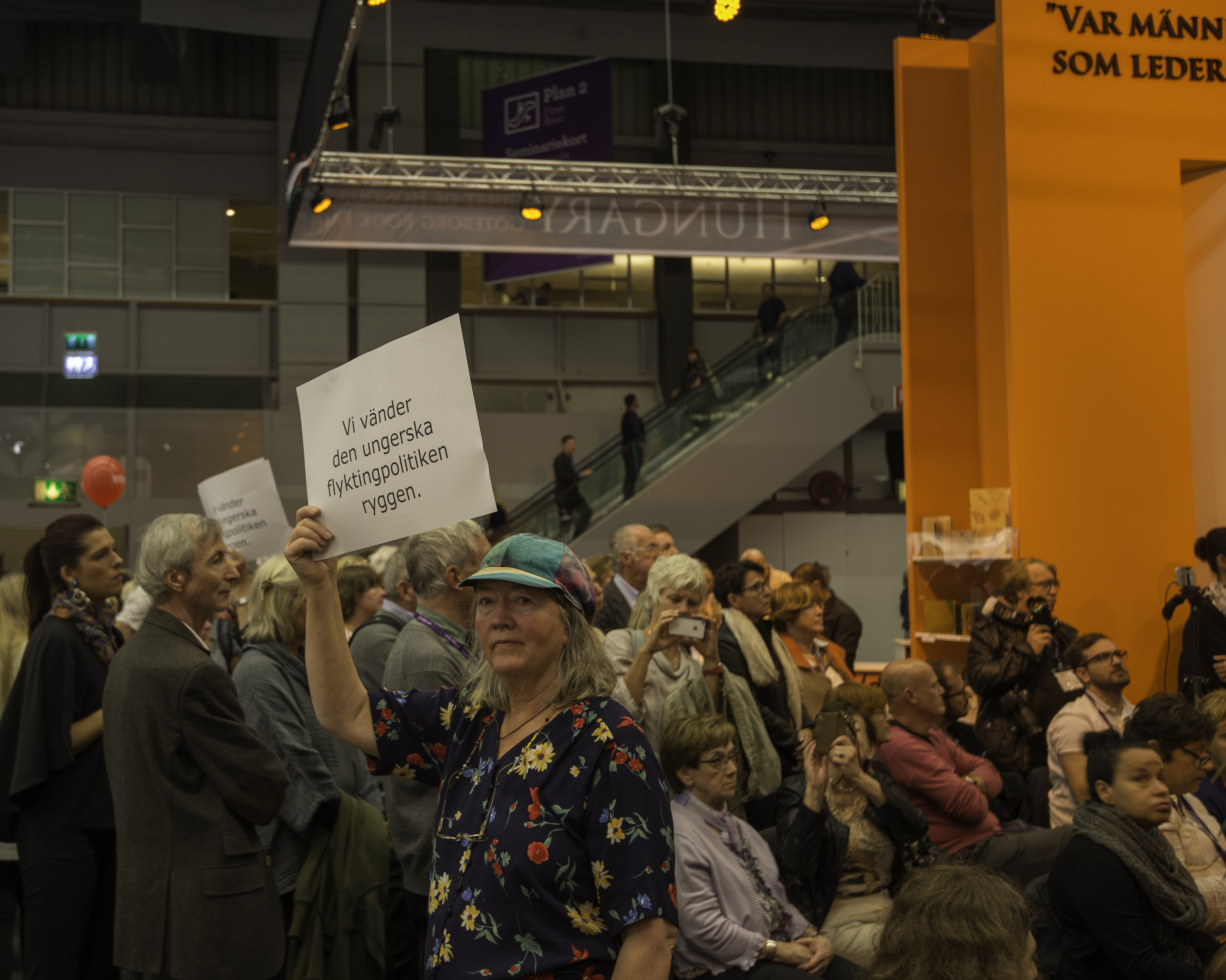 Ungerns monter på Bok- och biblioteksmässan 2015.